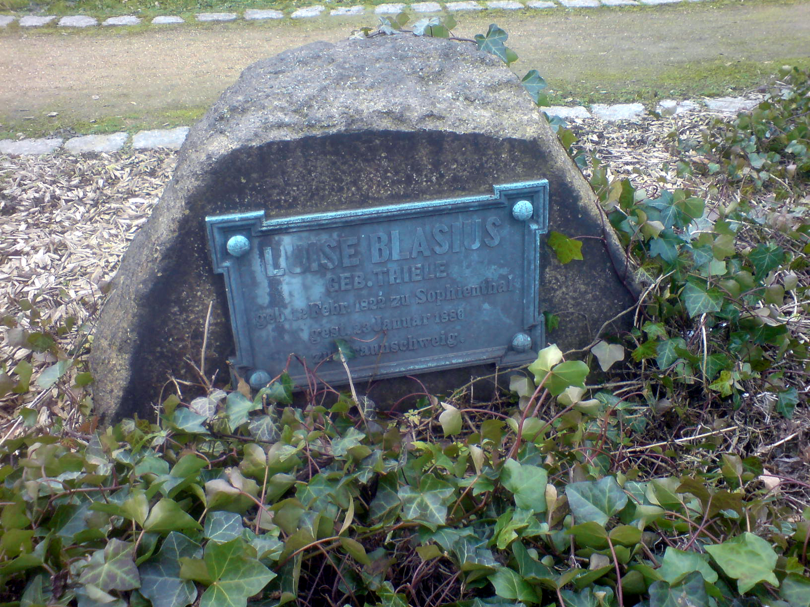 Grabinschrift: "Luise Blasius, geb. Thiele, geb. 12. Feb. 1822 zu Sophienthal, gest. 23. Januar 1886 zu Braunschweig" Foto aufgenommen auf dem Friedhof der Reformierten Gemeinde (Braunschweig, Juliusstrasse.)